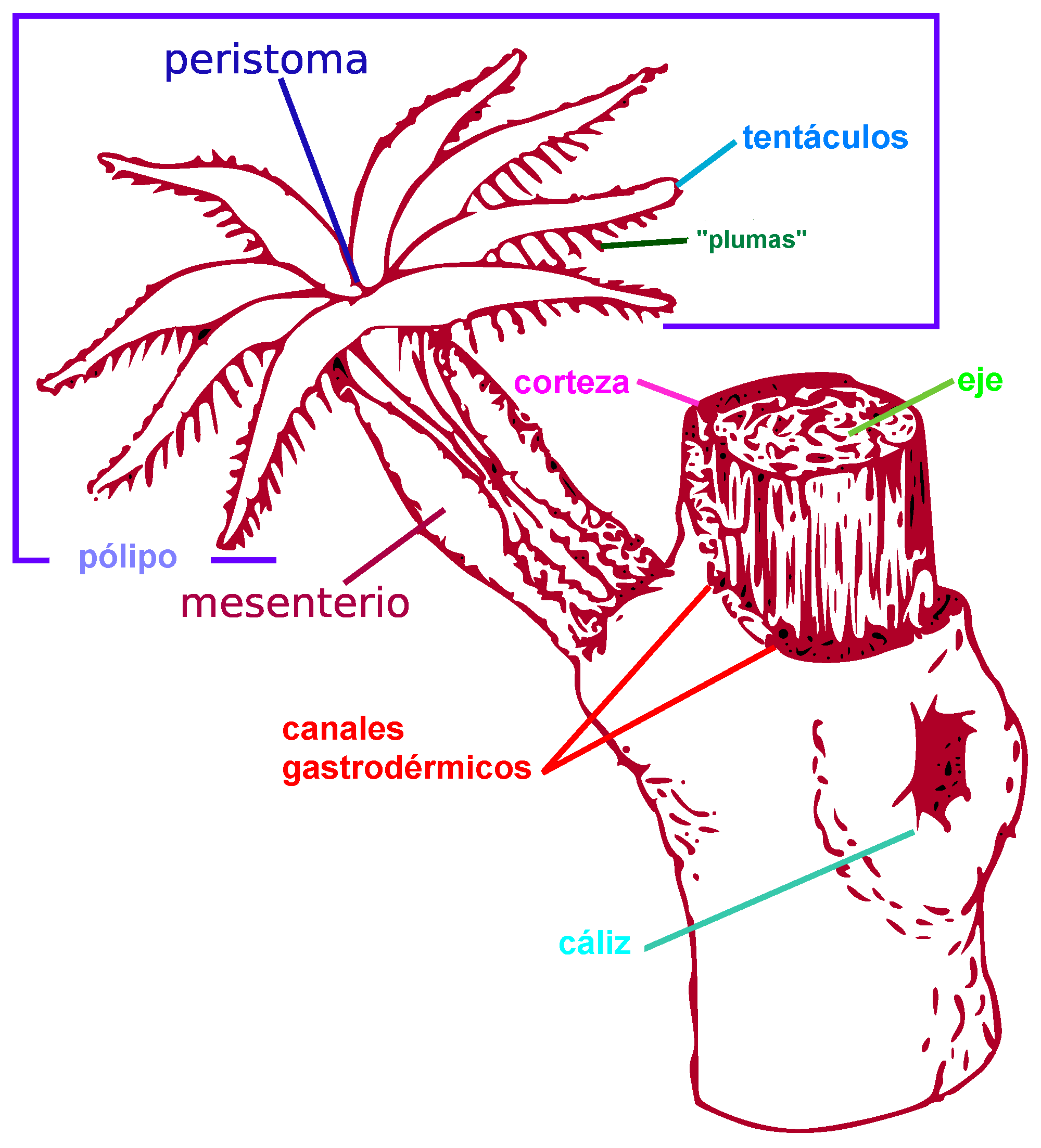 Adaptación de gráfico en italiano v.2